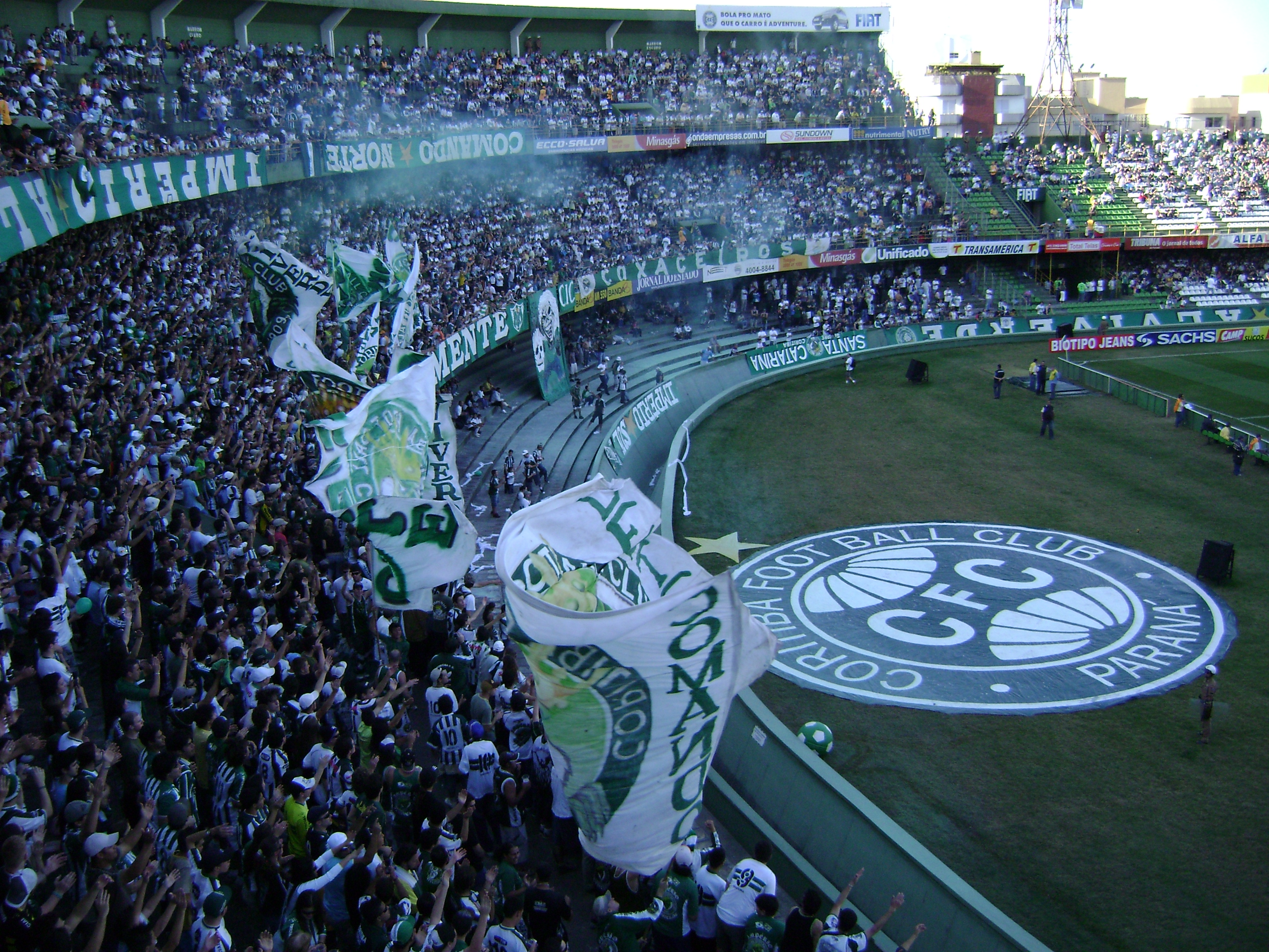 Coritiba fans in first half-time of Coritiba - CRB for the Brazilian Série B of 2007